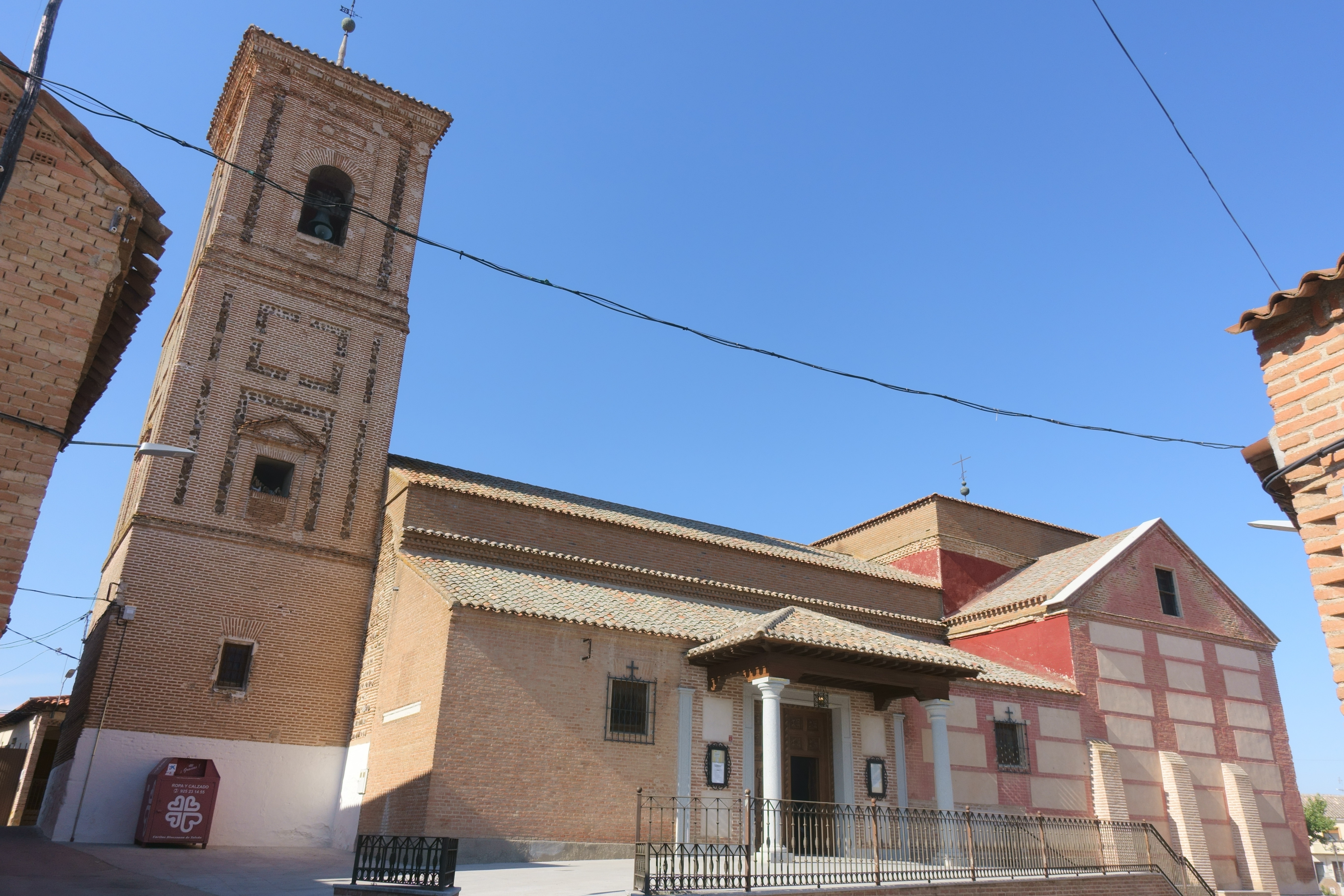 Iglesia de San Juan Bautista, La Mata (Toledo, España).